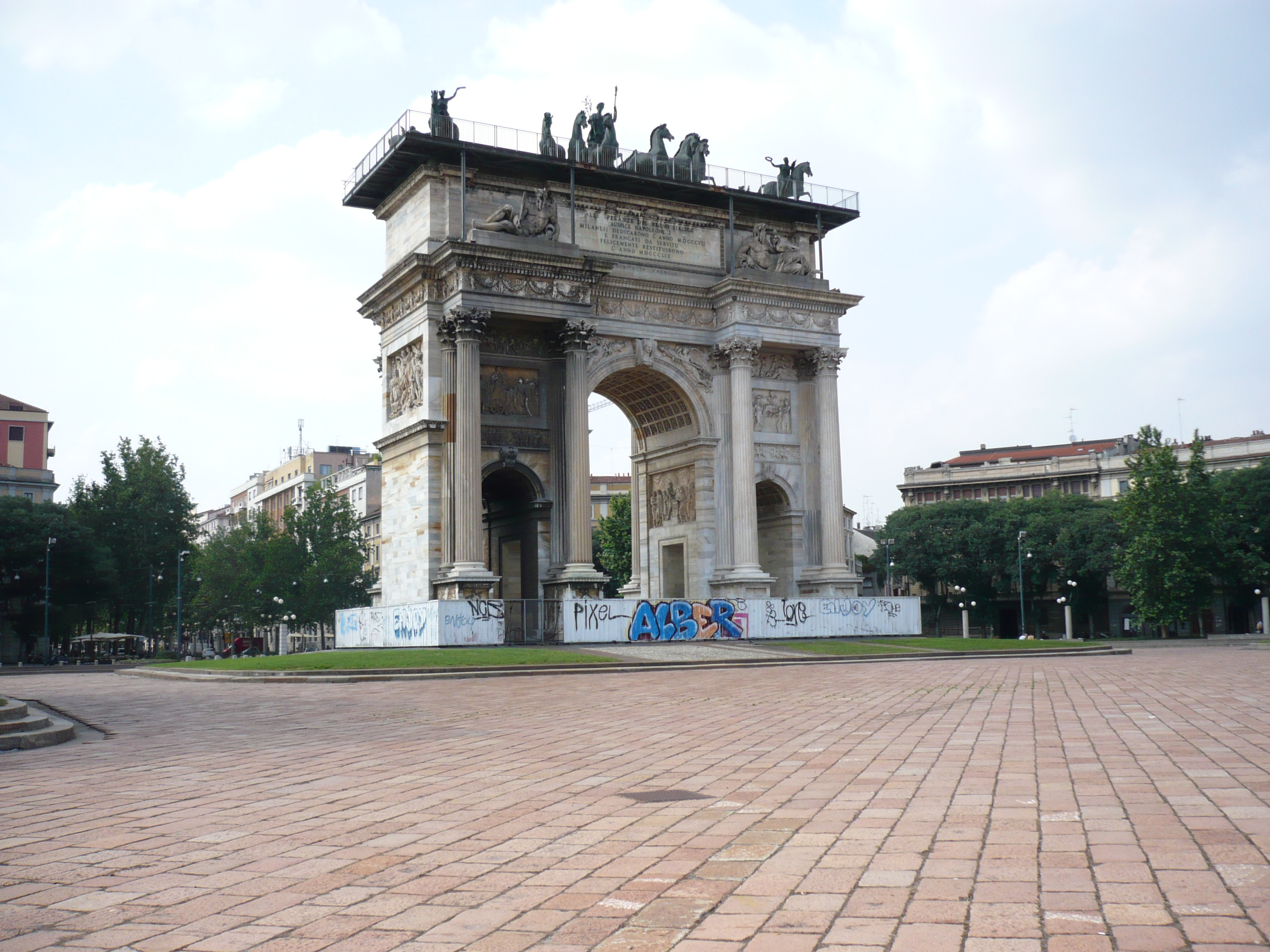 Arco della Pace a Milano